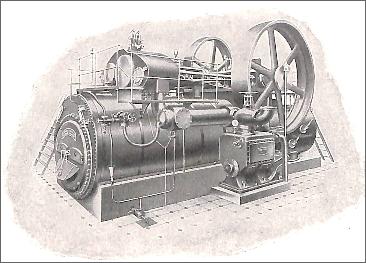 Cannstadt. - das 1903 in der Lokomobilfabrik Assmann und Stockder gebaute Industrie-Lokomobil mit einer Leistung von 400/630 PS und Eigengewicht von 78.500 kg - war bei der Markteinführung Weltrekordhalter.